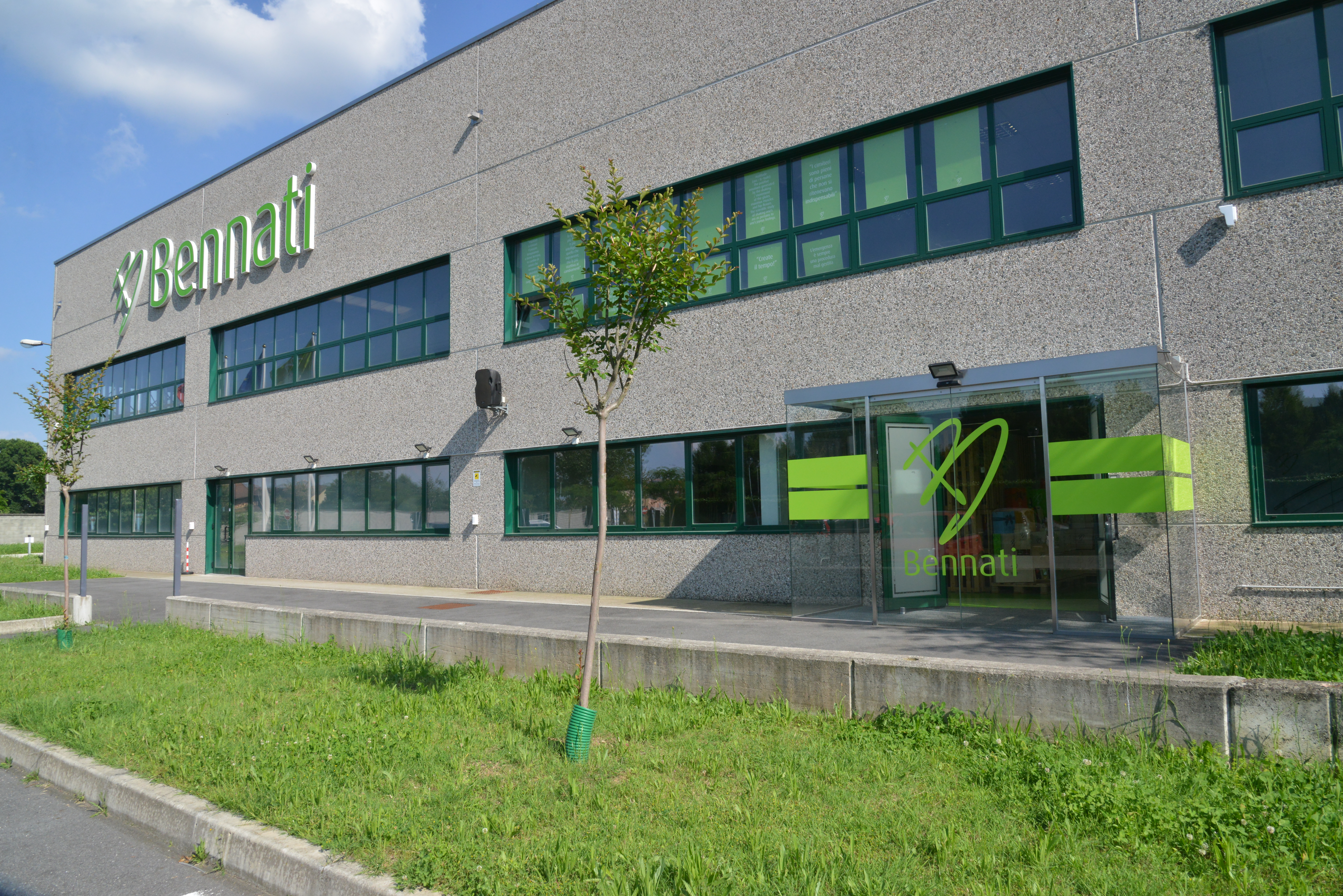 sede Bennati srl